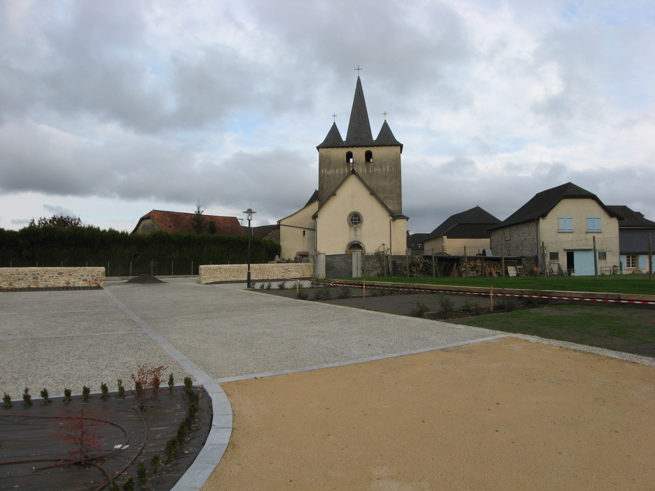 Eglise Notre Dame de Geüs-d'Oloron (Pyrénées-Atlantiques) (Pyrénées).